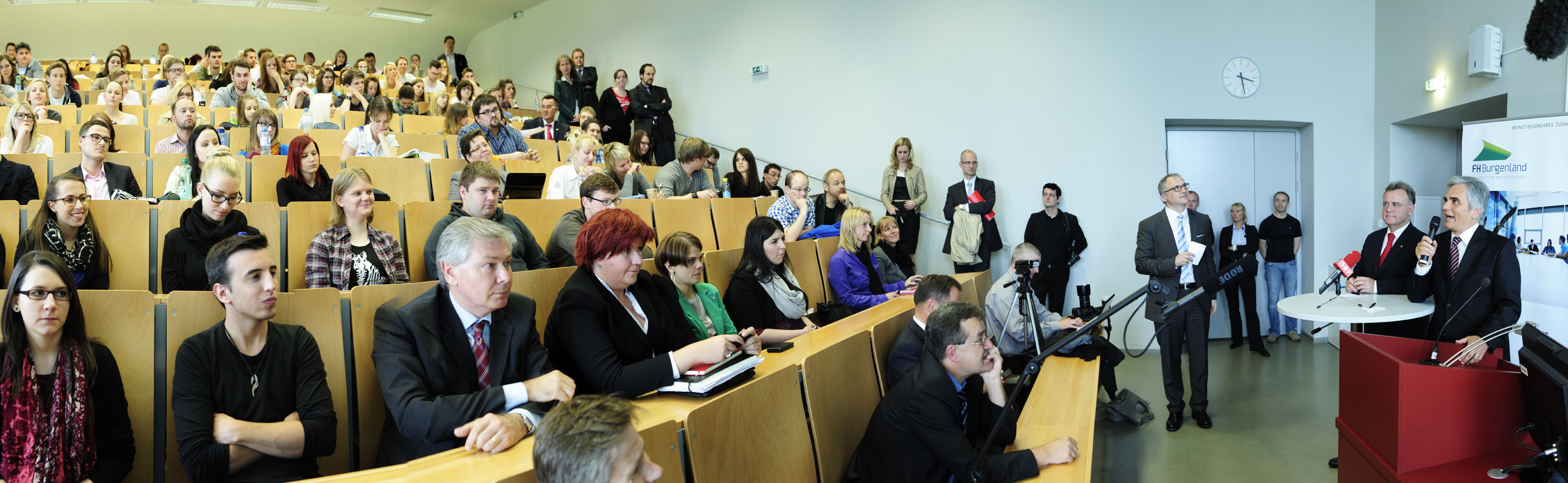 Bundeskanzler Werner Faymann besucht die FH Eisenstadt gemeinsam mit Landeshauptmann Hans Niessl. Diskussion mit Studierenden des Faches Wirtschaftsethik.